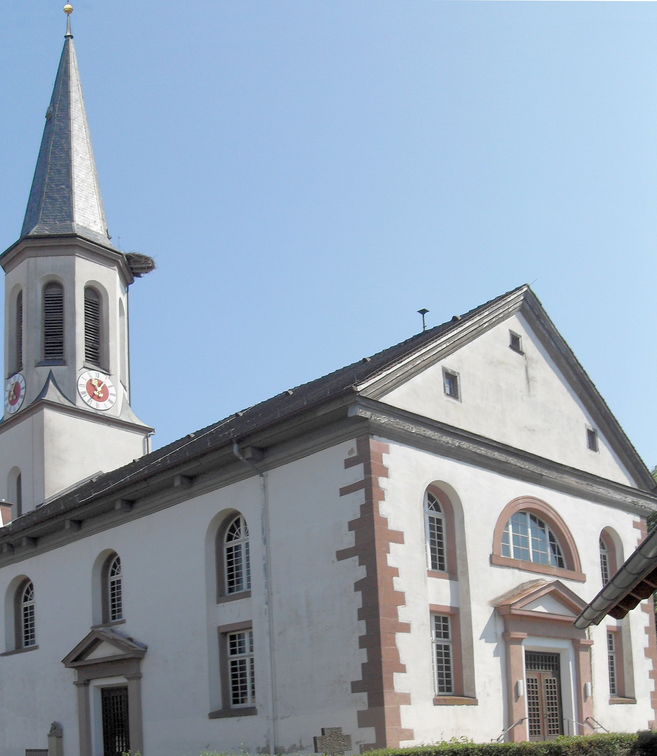 evangelische Kirche Vörstetten, 1803 nach Plänen von Friedrich Weinbrenner erweitert, 1860 sowie 1978/79 renoviert